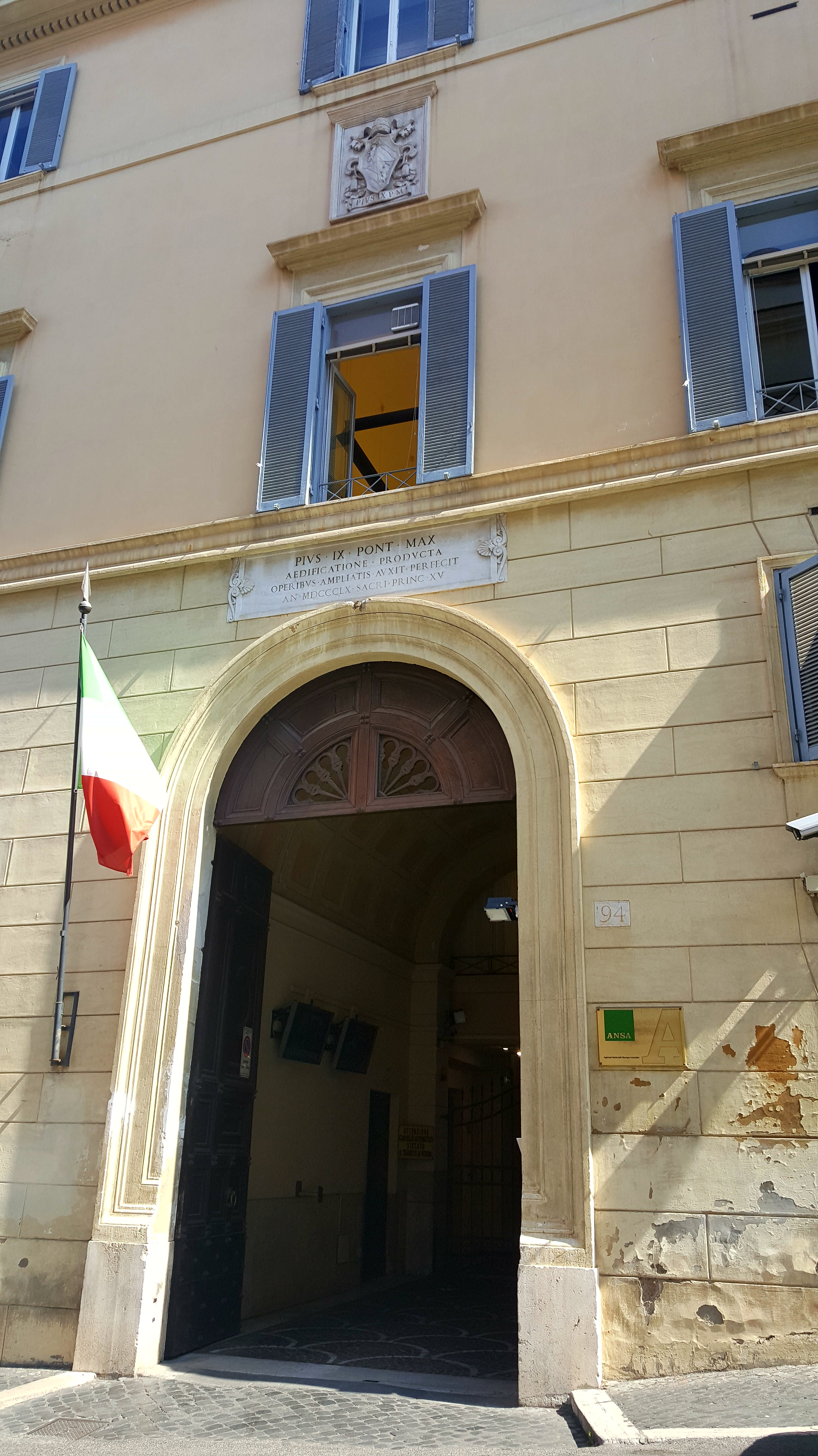 Sede ANSA a Roma, Via della Dataria, 94